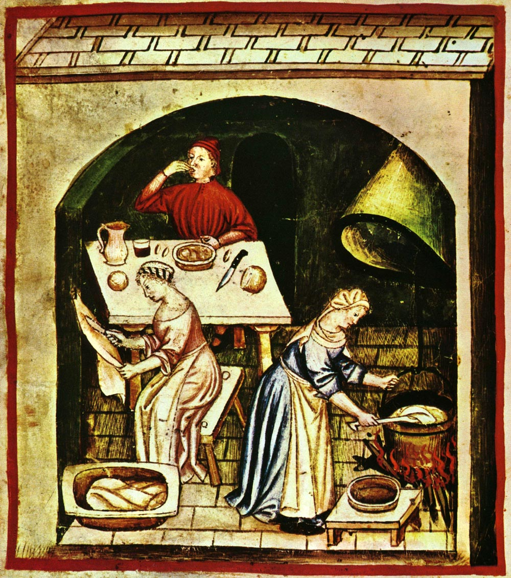 Tacuina sanitatis (XIV century)